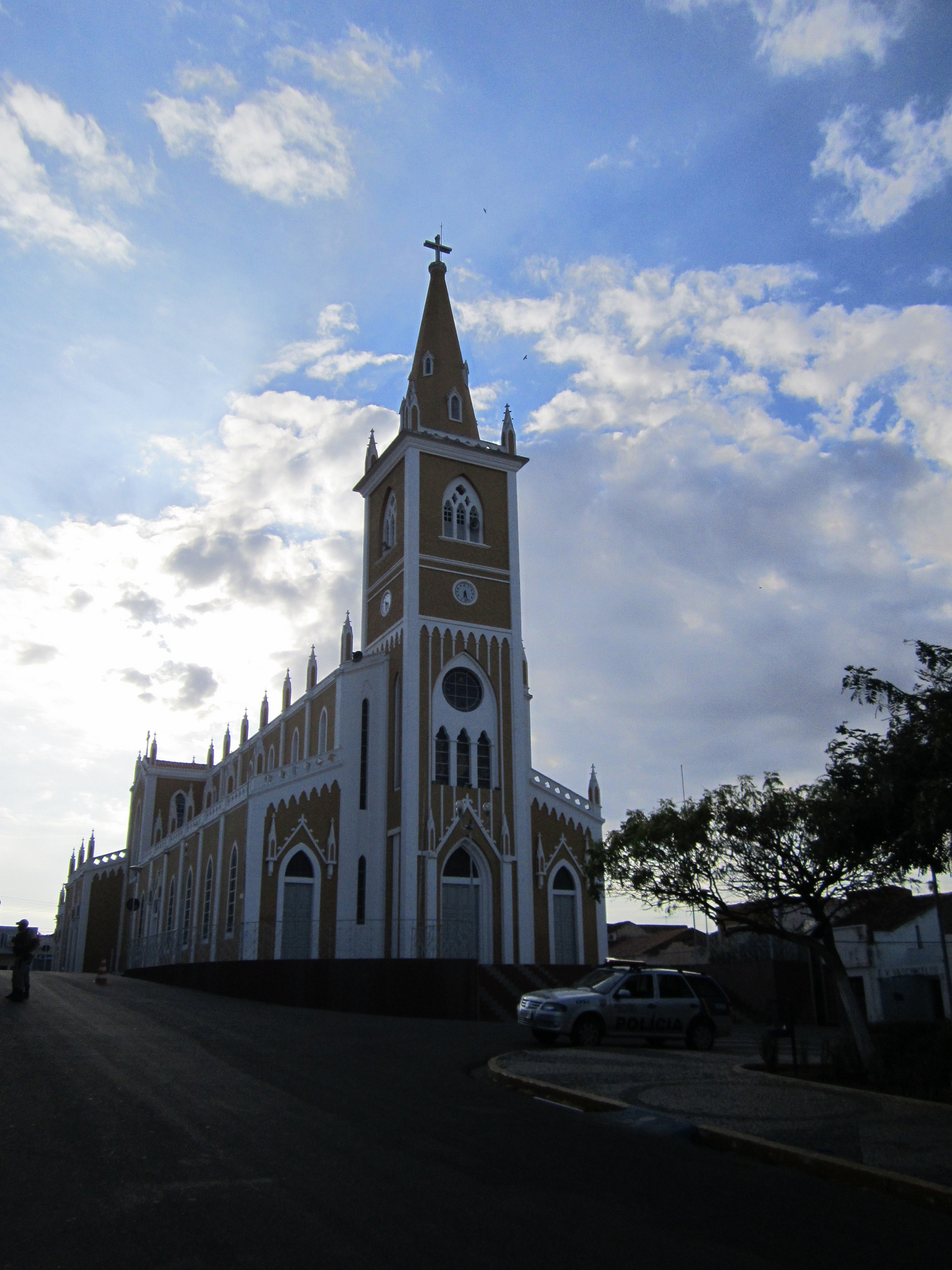 Igreja de Nossa Senhora da Penha - Serra Talhada - Pernambuco - Brasil